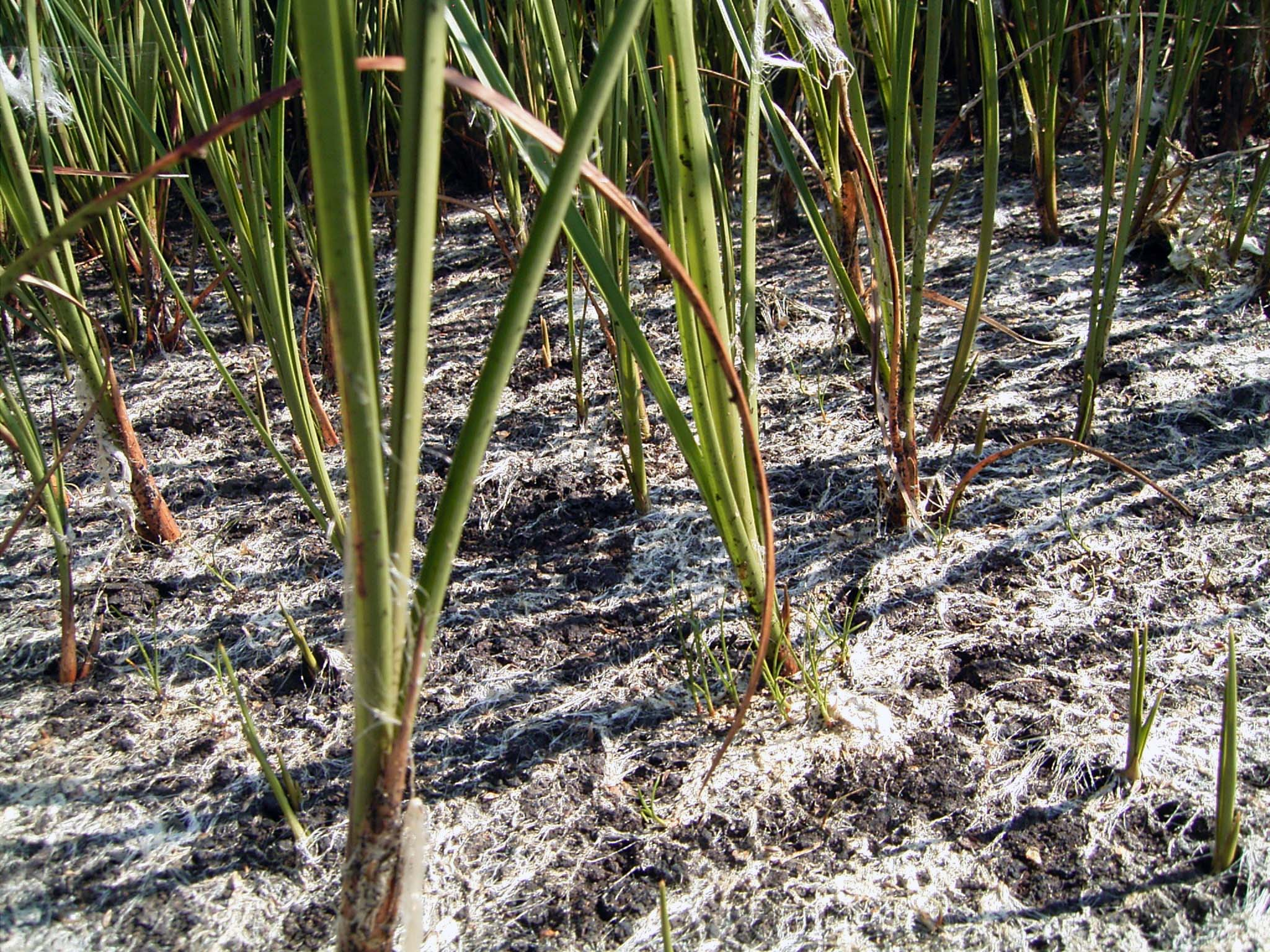 Schmalblättriges Wollgras (Eriophorum angustifolium) besiedelt nackte Torffläche im Bereich Schwaneburger Moor (Landkreis Cloppenburg, Niedersachsen) – Anmerkung: Im Bereich gibt es mehrere Naturschutzgebiete; unklar, ob in einem davon aufgenommen, kann auch außerhalb sein, vgl. anderes Bild.